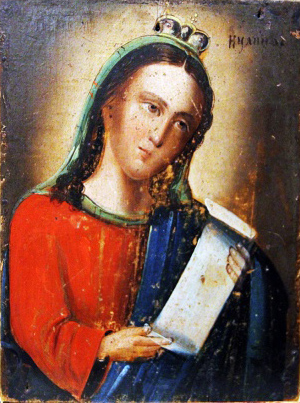 Икона Св. Акулина (Акилина). Материал: Дерево. Смешанная техника. Размер: 18 х 24 см Предположительно конец XIX — начало XX века.